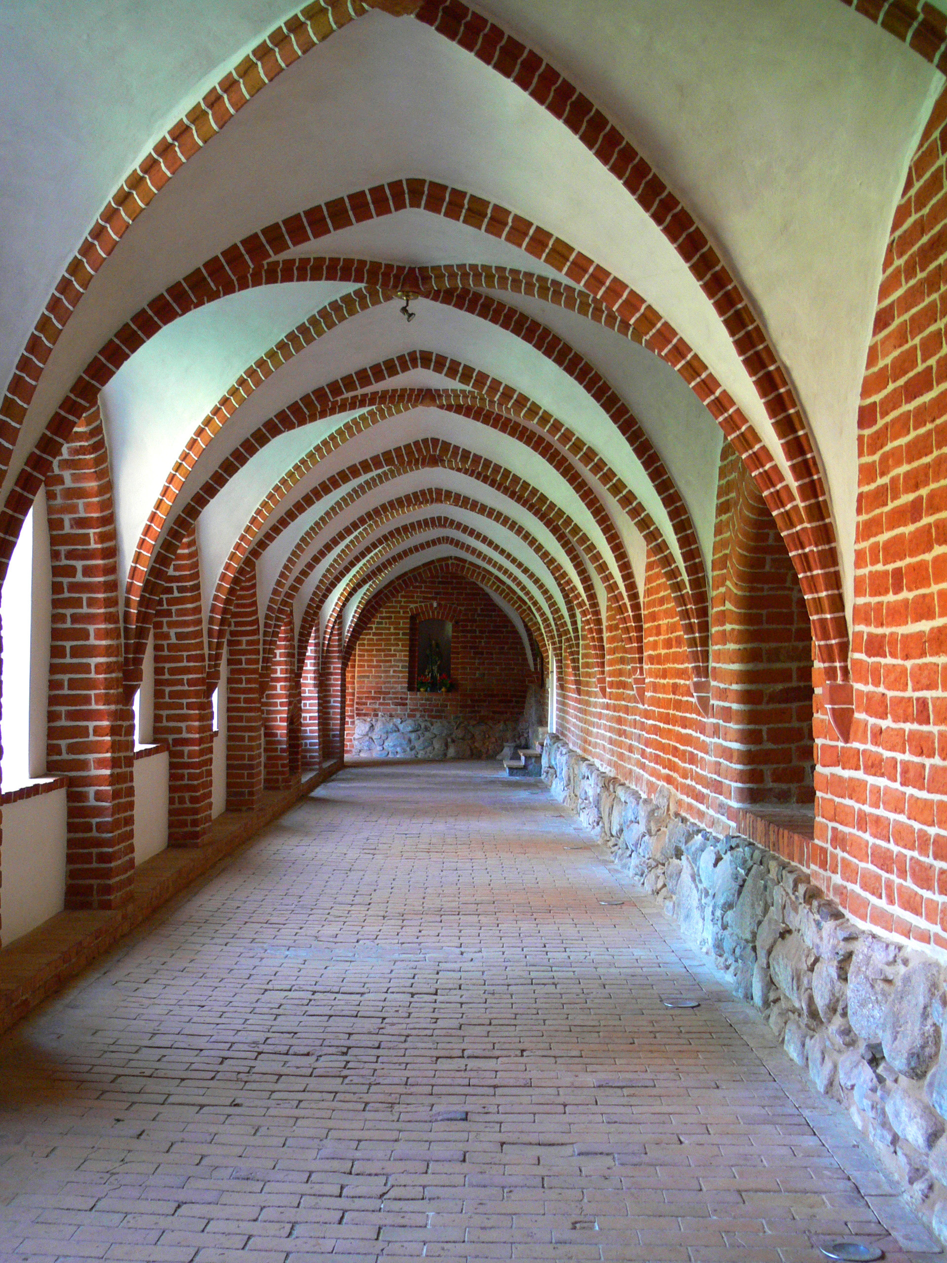 Żarnowiec, klasztor, 4 ćw. XIII, 1 poł. XIV, 1897-1907, 1959, 1976